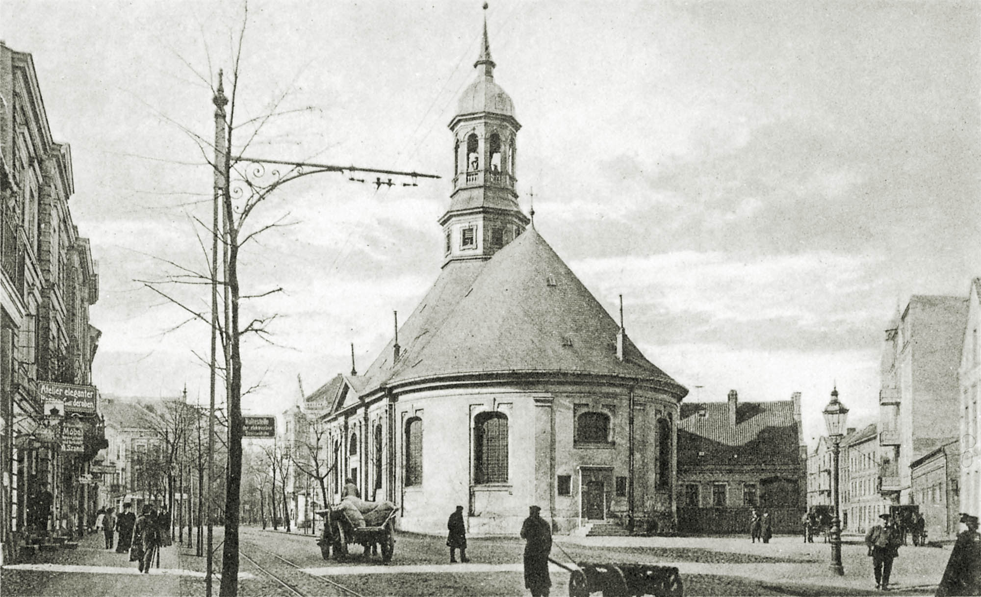 Fotografie der Litauischen Kirche in Tilsit